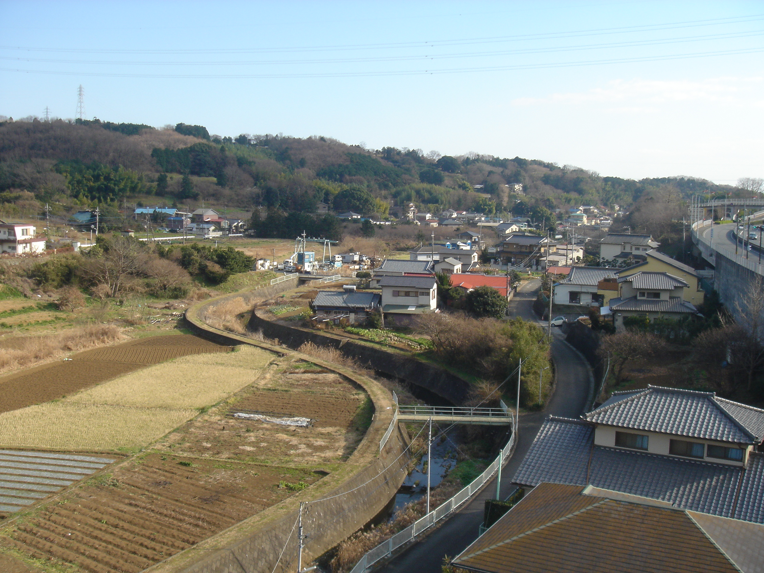 葛川。神奈川県中郡中井町。